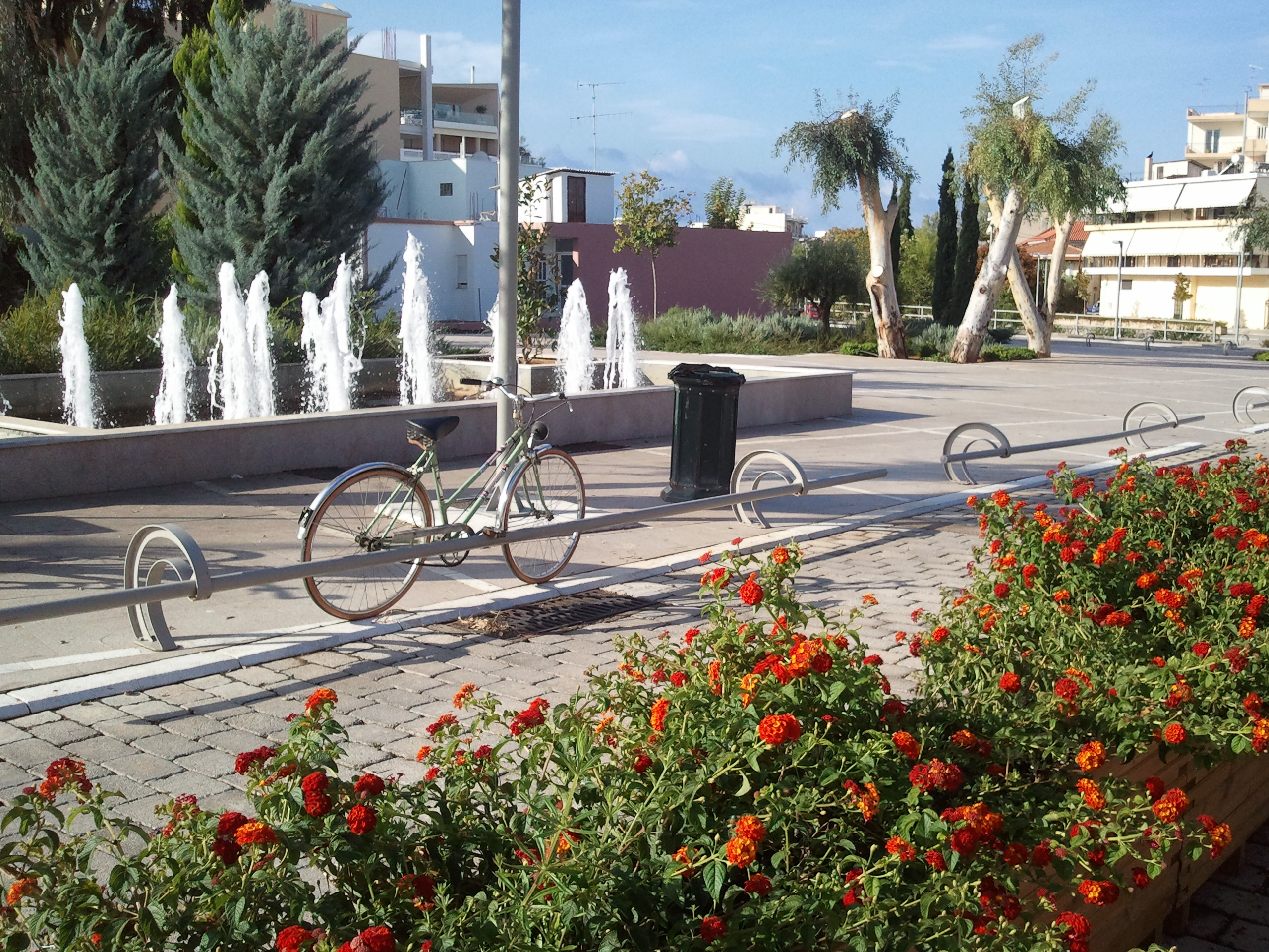 Συντριβάνι, Αμαλιάδα